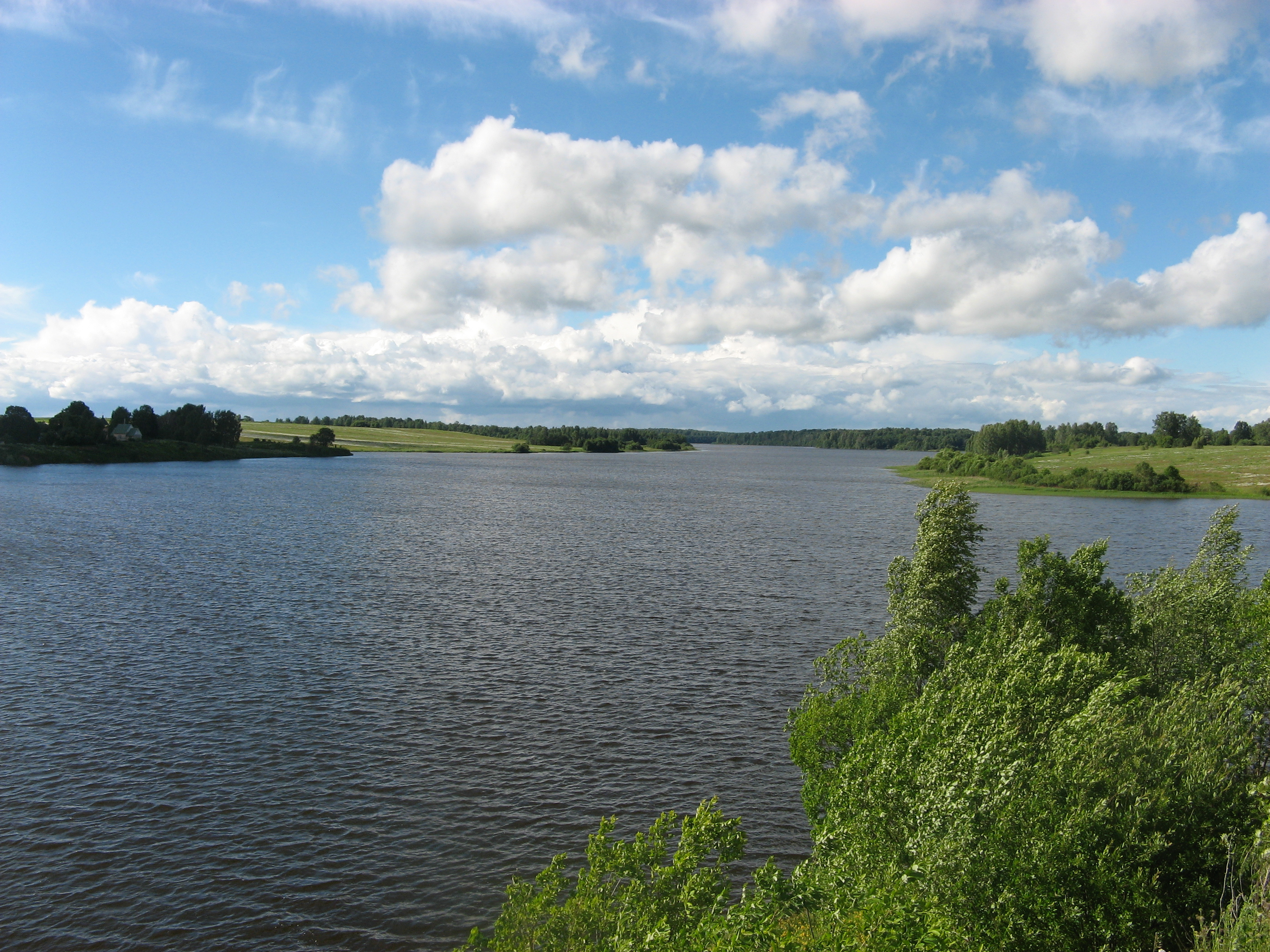 Вид на Вазузу с моста через водохранилище в районе деревни Хлепень.